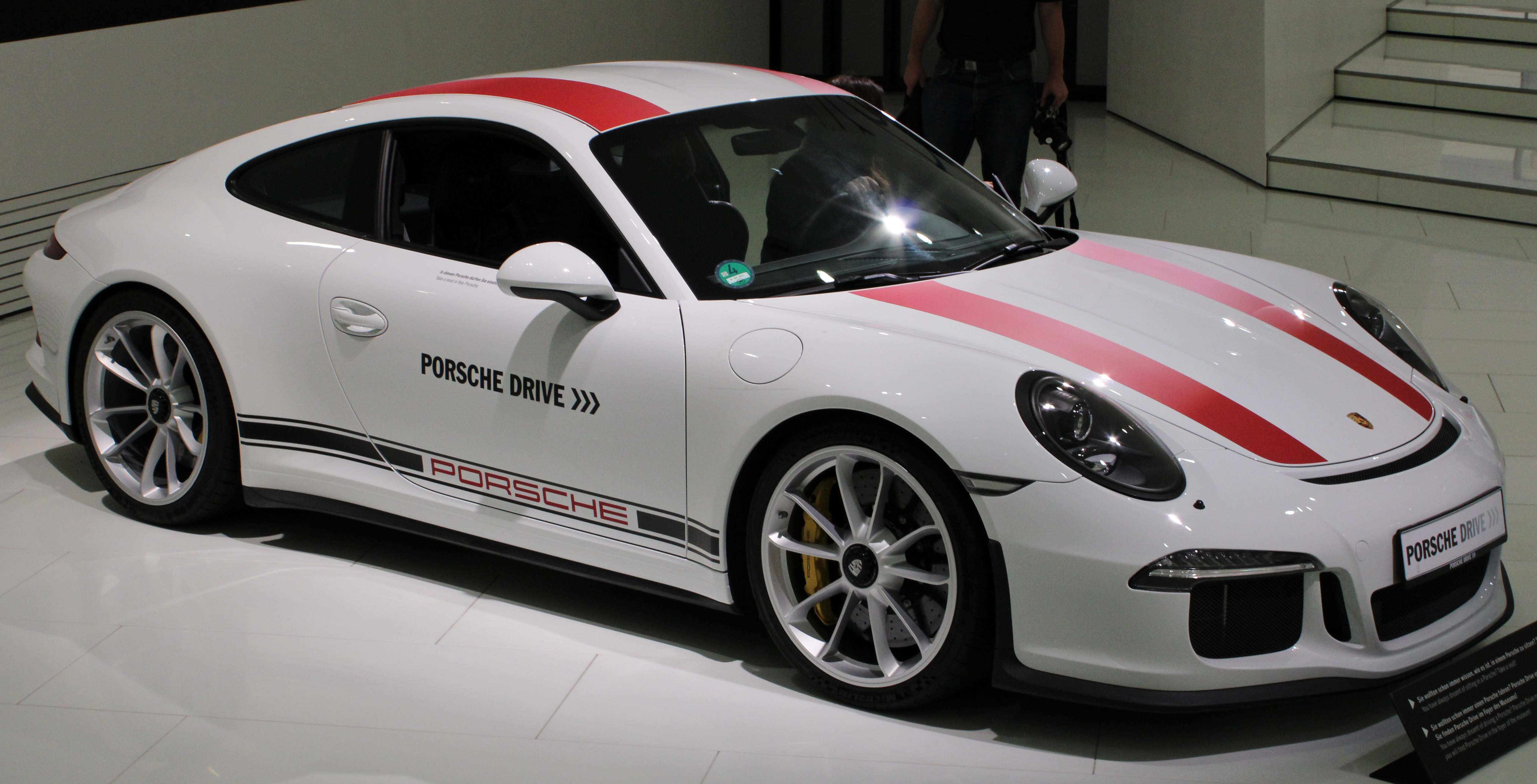 Porsche 911 R im Porsche Museum 2018